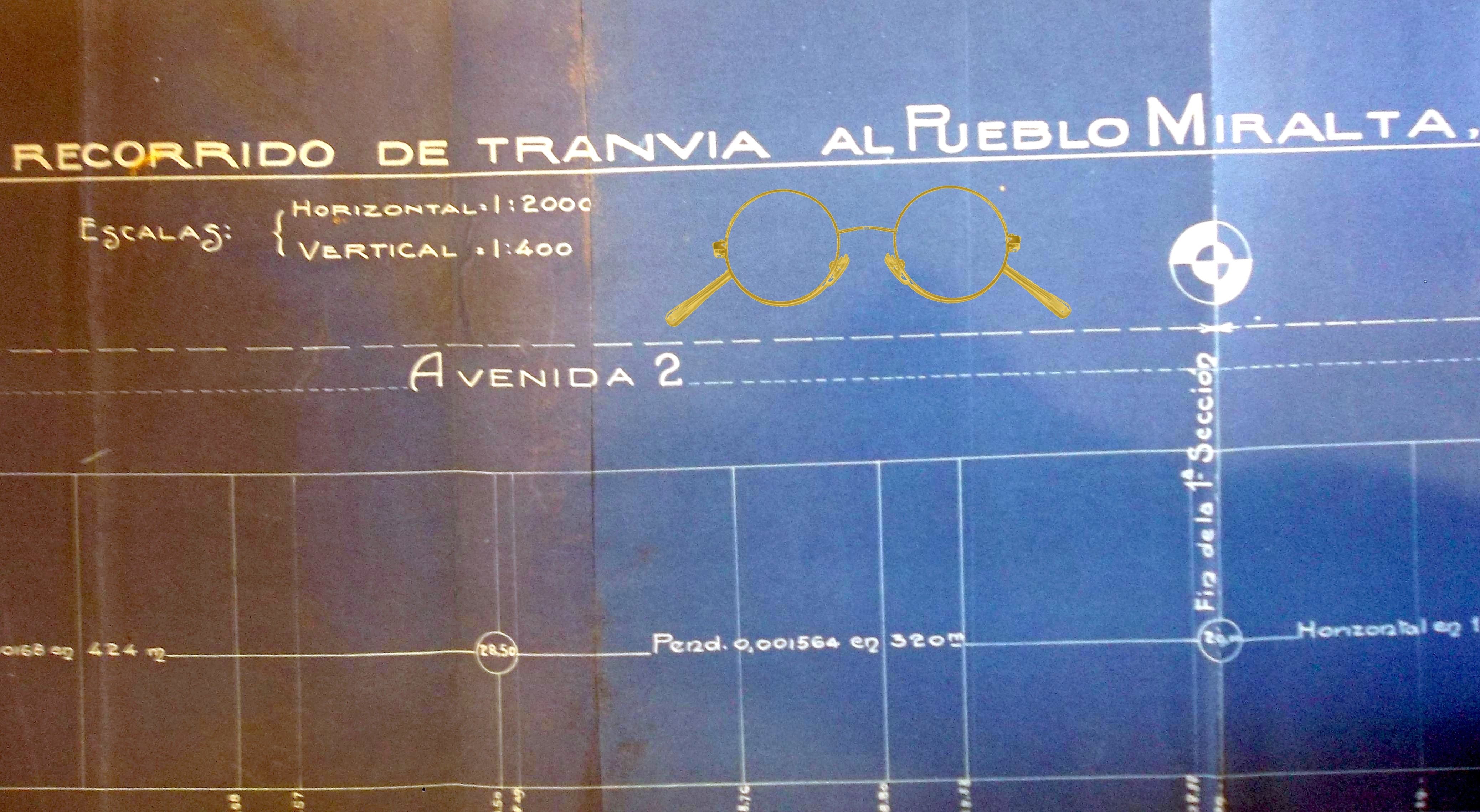 Pertenece a la colección del Doctor Federico G. Bordese. Investigador y apasionado del Barrio Altamira.